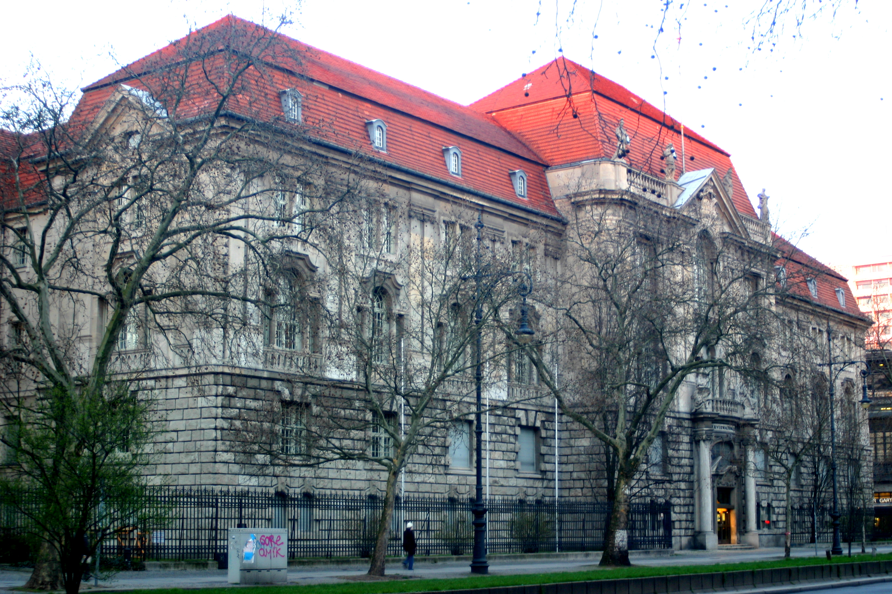 Hardenbergstraße 31, Berlin-Charlottenburg, Germany Oberverwaltungsgericht (OVG) Berlin-Brandenburg, ehemaliges Preußische OVG / Higher Administrative Court Berlin-Brandenburg